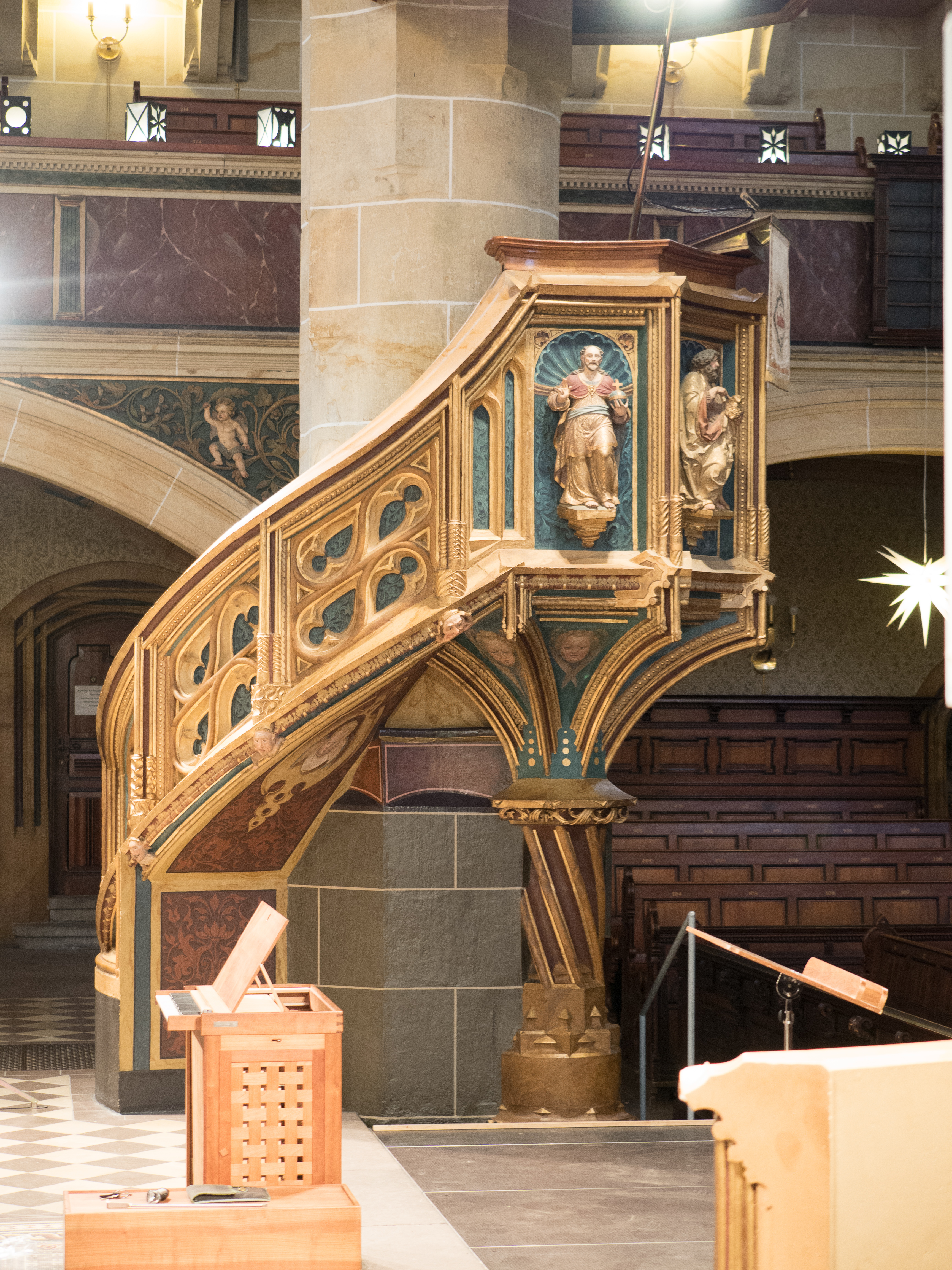 Kanzel der Marienkirche zu Pirna. um 1520 von Franz Maidburg und anderen gefertigt.